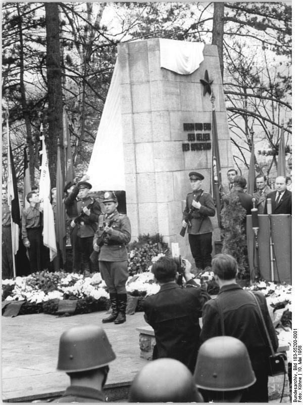 Meiningen, Ehrenhain Zentralbild Köhne 10.5.1958 Qua-Qu. Einweihung eines Ehrenhaines für die toten Sowjethelden in Meiningen. Unter den Salutschüssen einer Einheit der Bereitschaftspolizei wurde am Morgen des Tages der Befreiung (8.5.58) in Meiningen ein Denkmal und ein Ehrenhain für die Befreiung Deutschlands vom Faschismus und für die gefallenen Sowjetsoldaten eingeweiht. An dem Mahnmals hielten sowjetische und deutsche Soldaten die Ehrenwache. Hunderte Werktätige aus Betrieben und Institutionen legten im Gedenken an die Toten Helden Kränze nieder. UBz: Während der Denkmalsenthüllung.